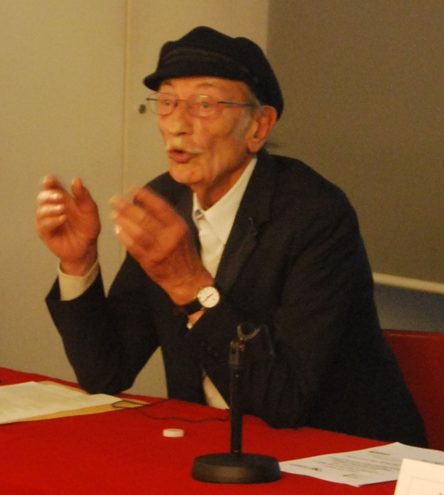 Luigi Snozzi in Paris, 14 nov. 2009